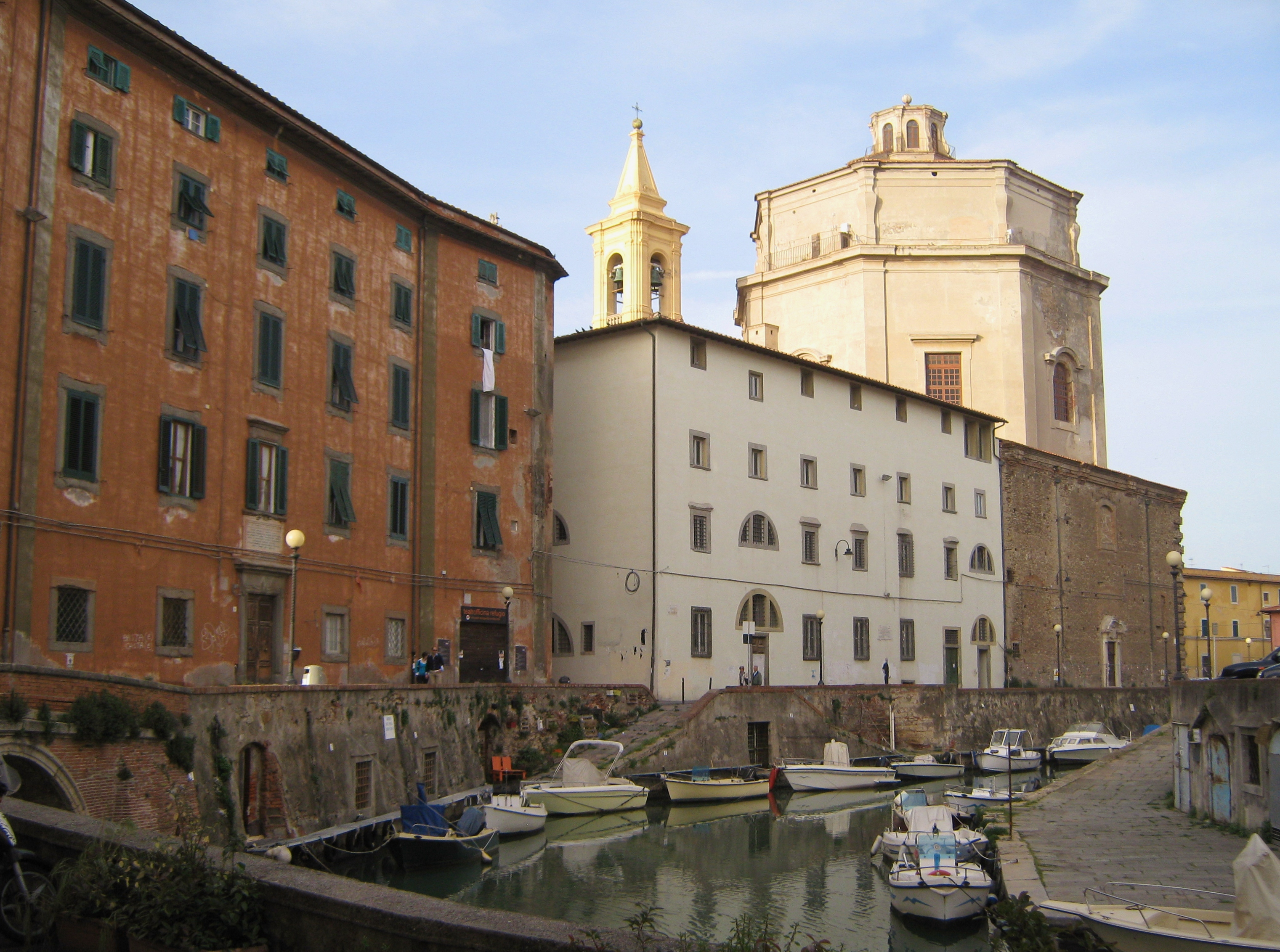 Livorno: chiesa di Santa Caterina, attiguo ex convento (palazzo dei Domenicani) e, sulla sinistra, il palazzo del Refugio.